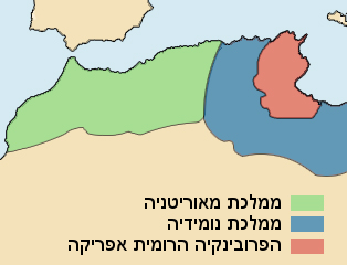 יצר: גיא, לפי (2)